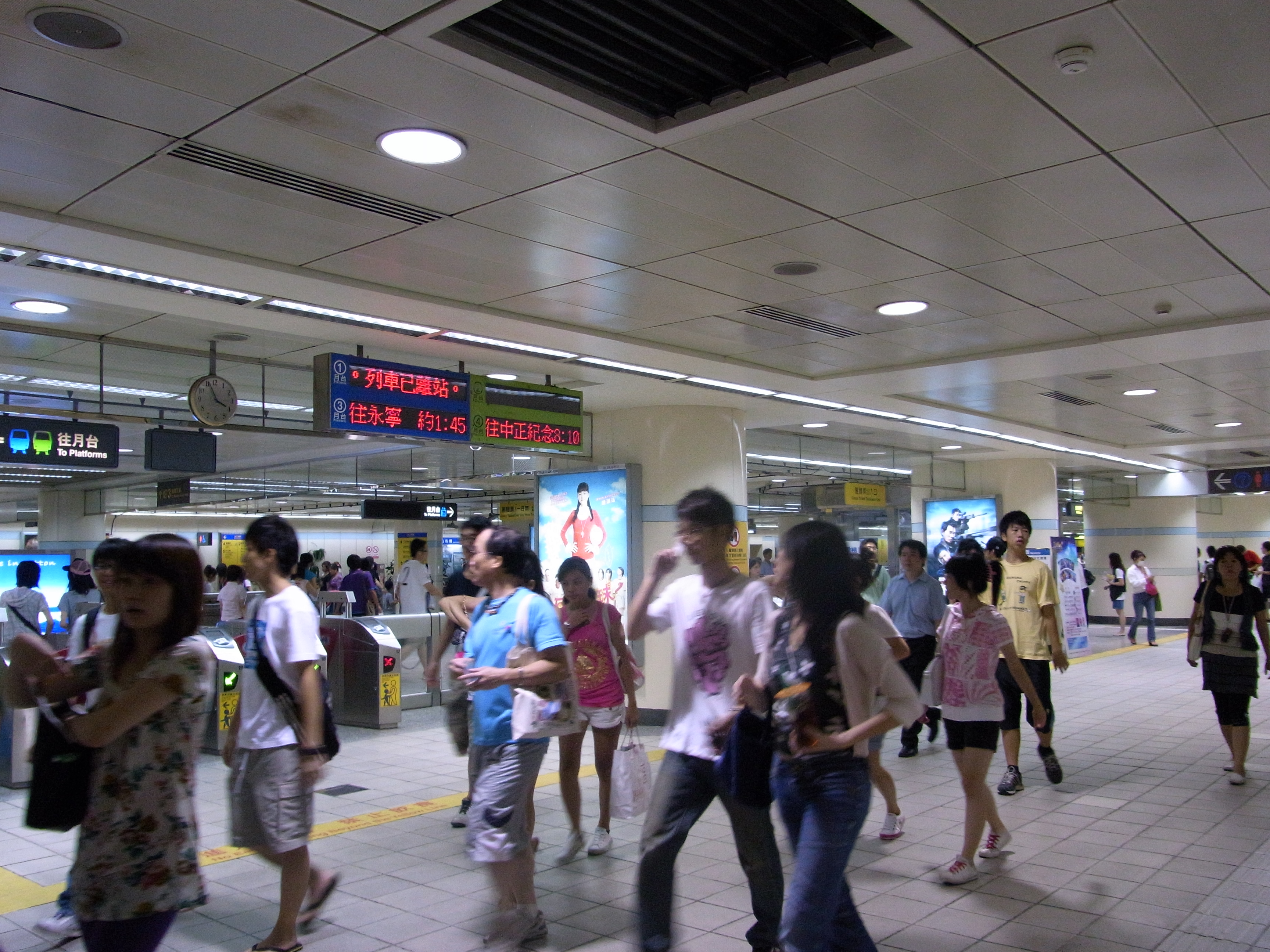 西門站大廳